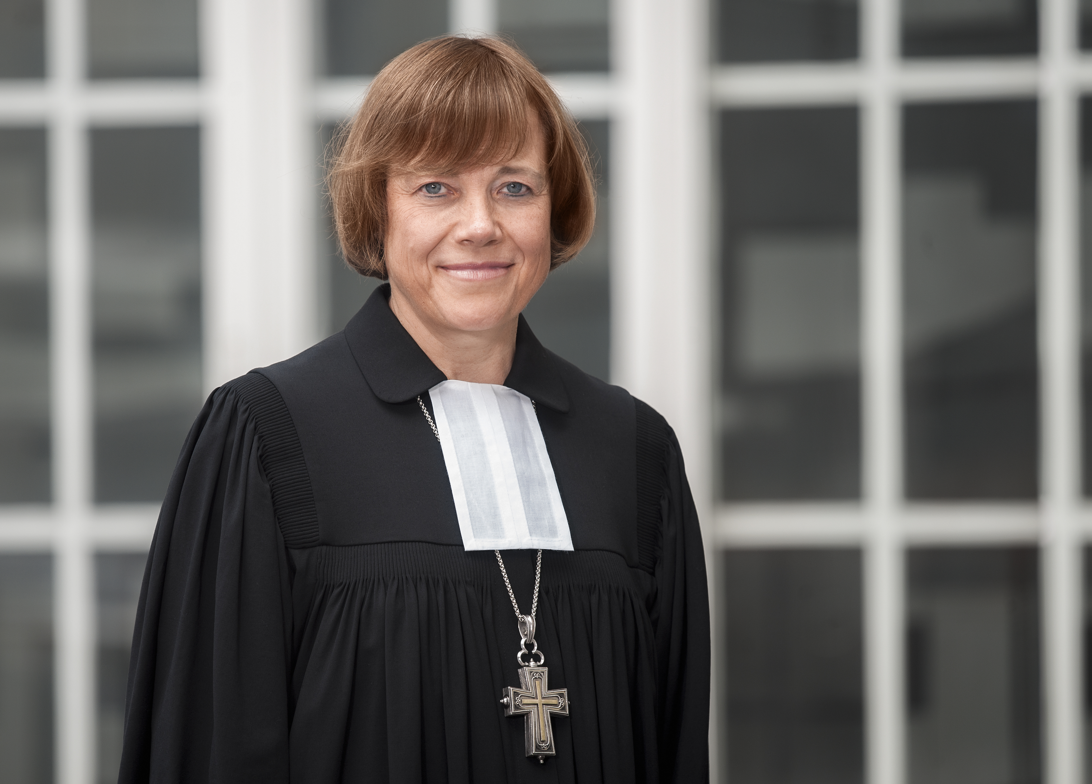 Präses Annette Kurschus im Talar